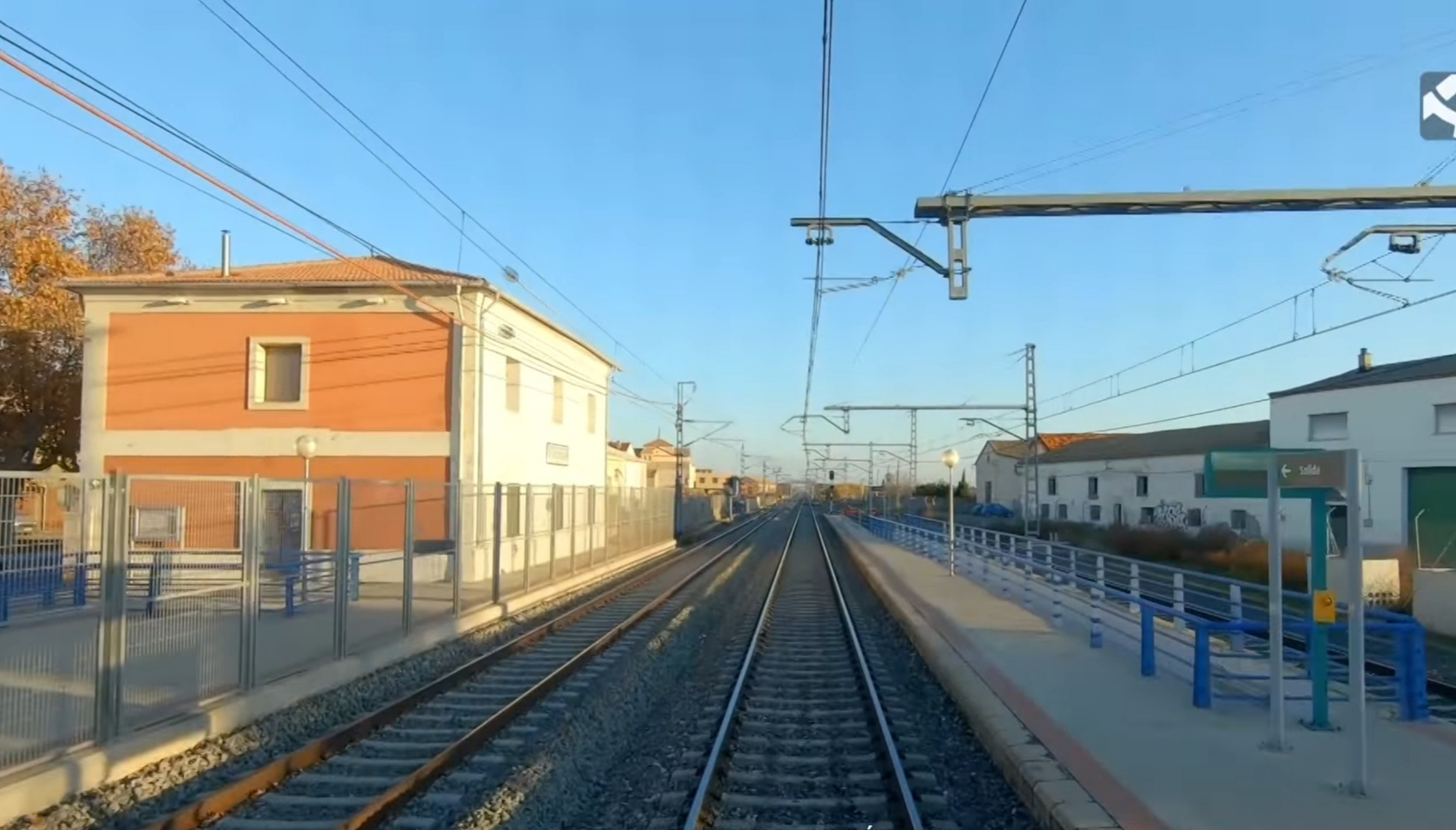 Estación de Villanueva de Gállego vista desde la vía de ancho ibérico principal, sentido Huesca. El edificio de viajeros queda a la izquierda y queda separada de la vía pasante del AVE por una valla metálica.